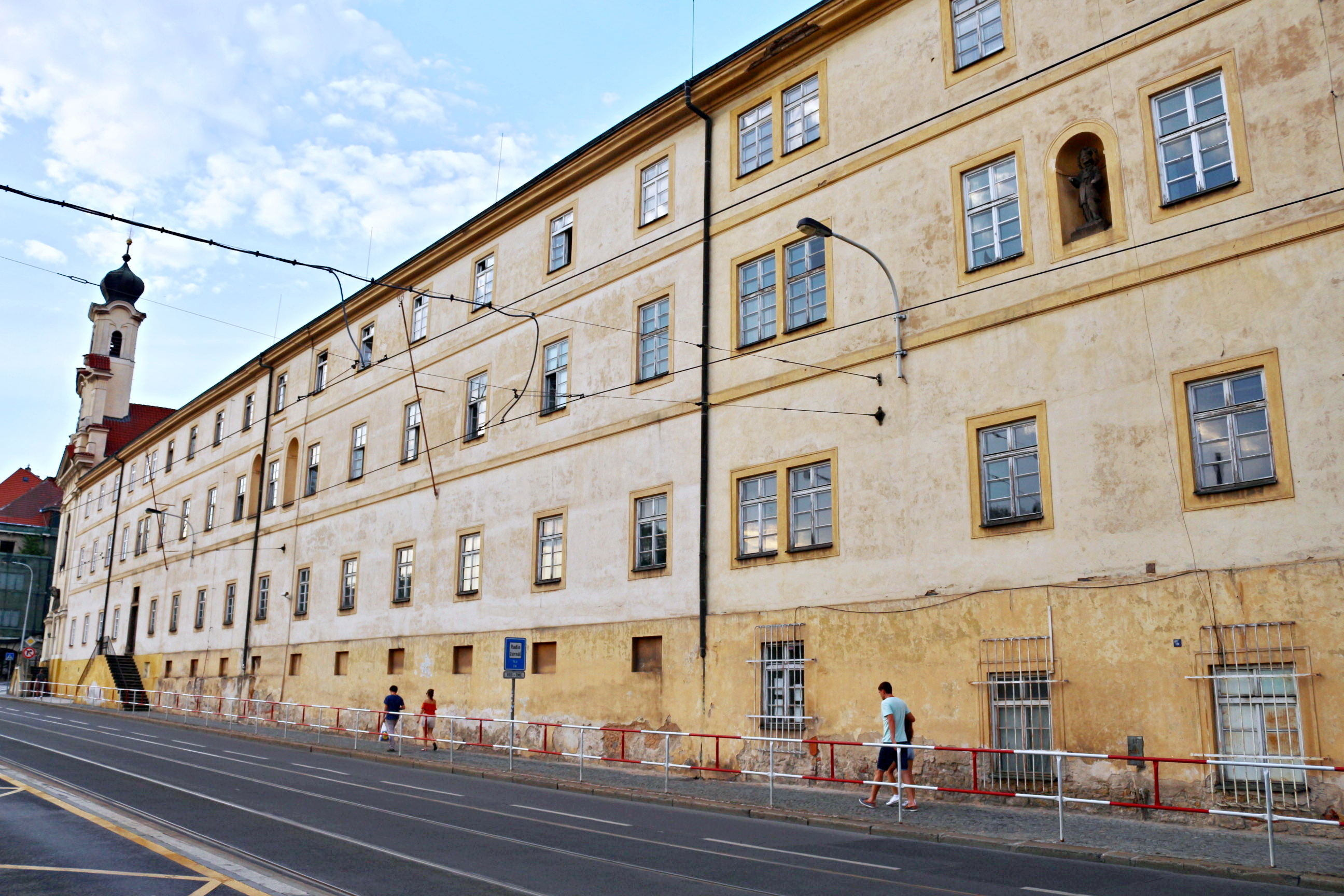 Kostel Panny Marie Sedmibolestné u alžbětinek